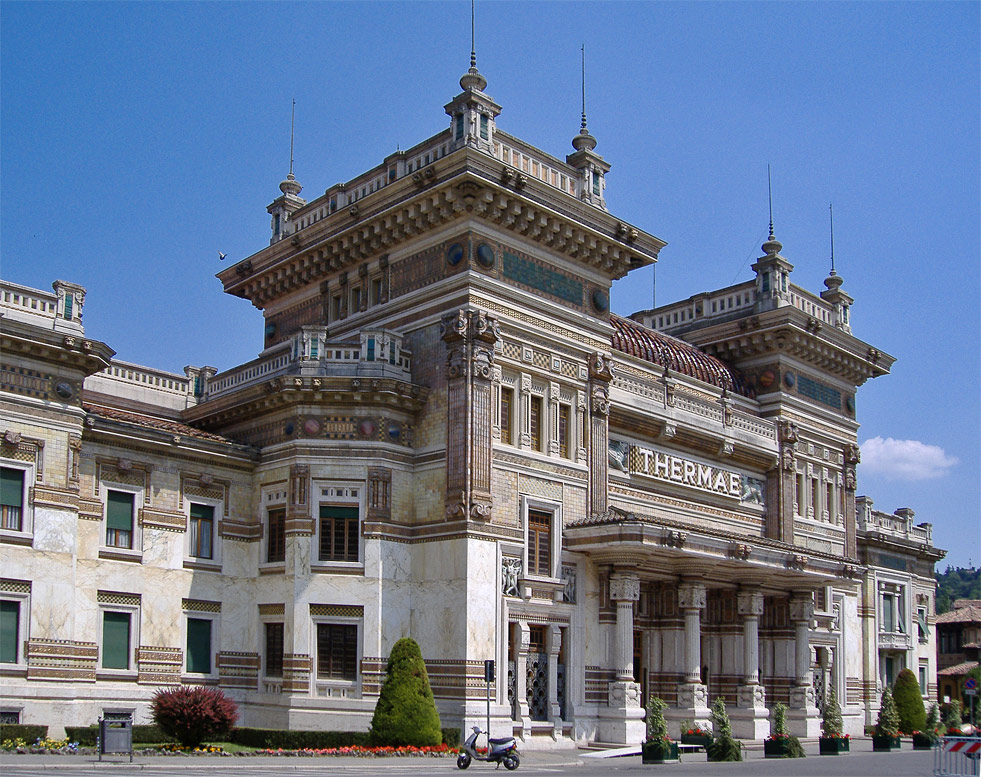 Terme Berzieri - Salsomaggiore Terme (Italy)